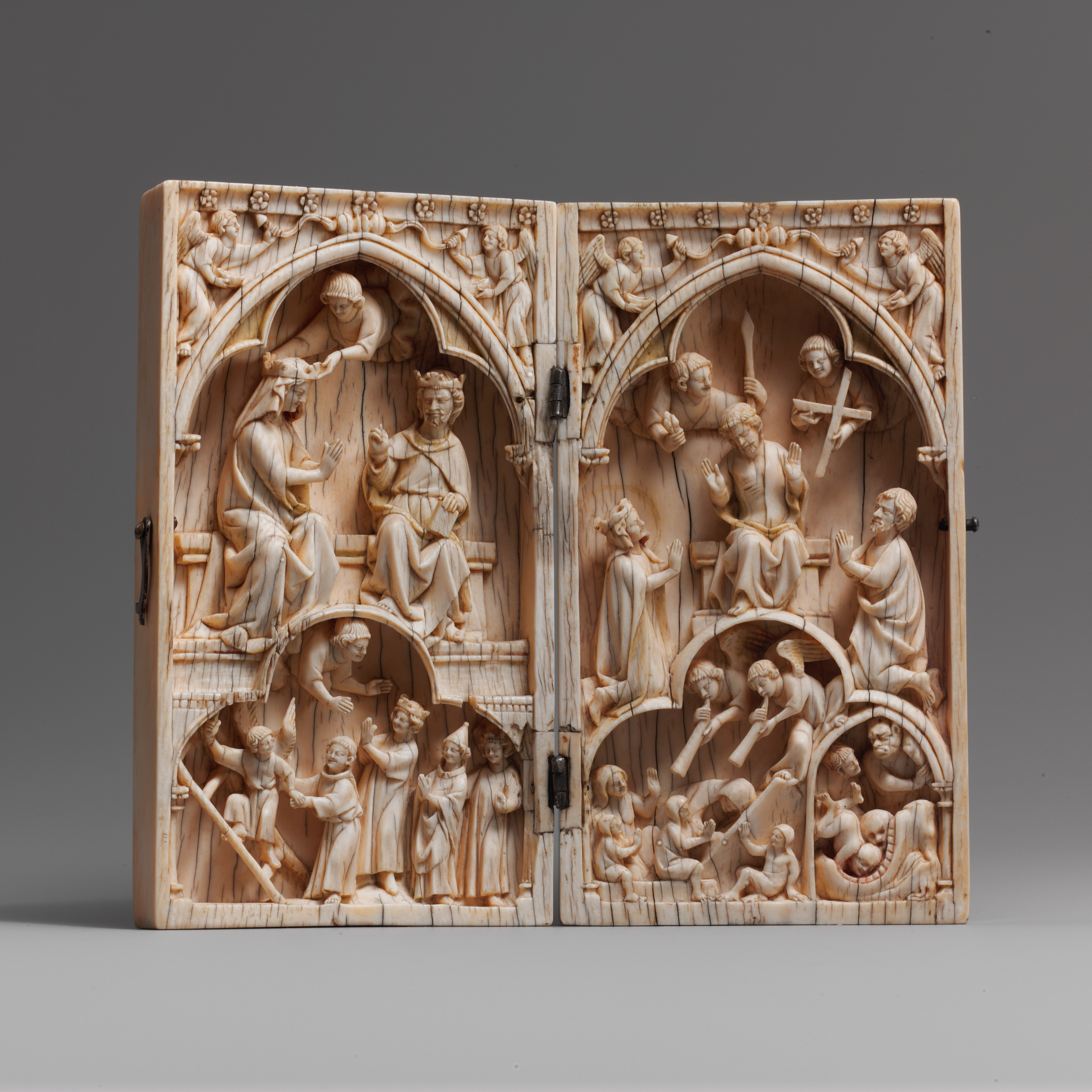 French; Diptych; Ivories